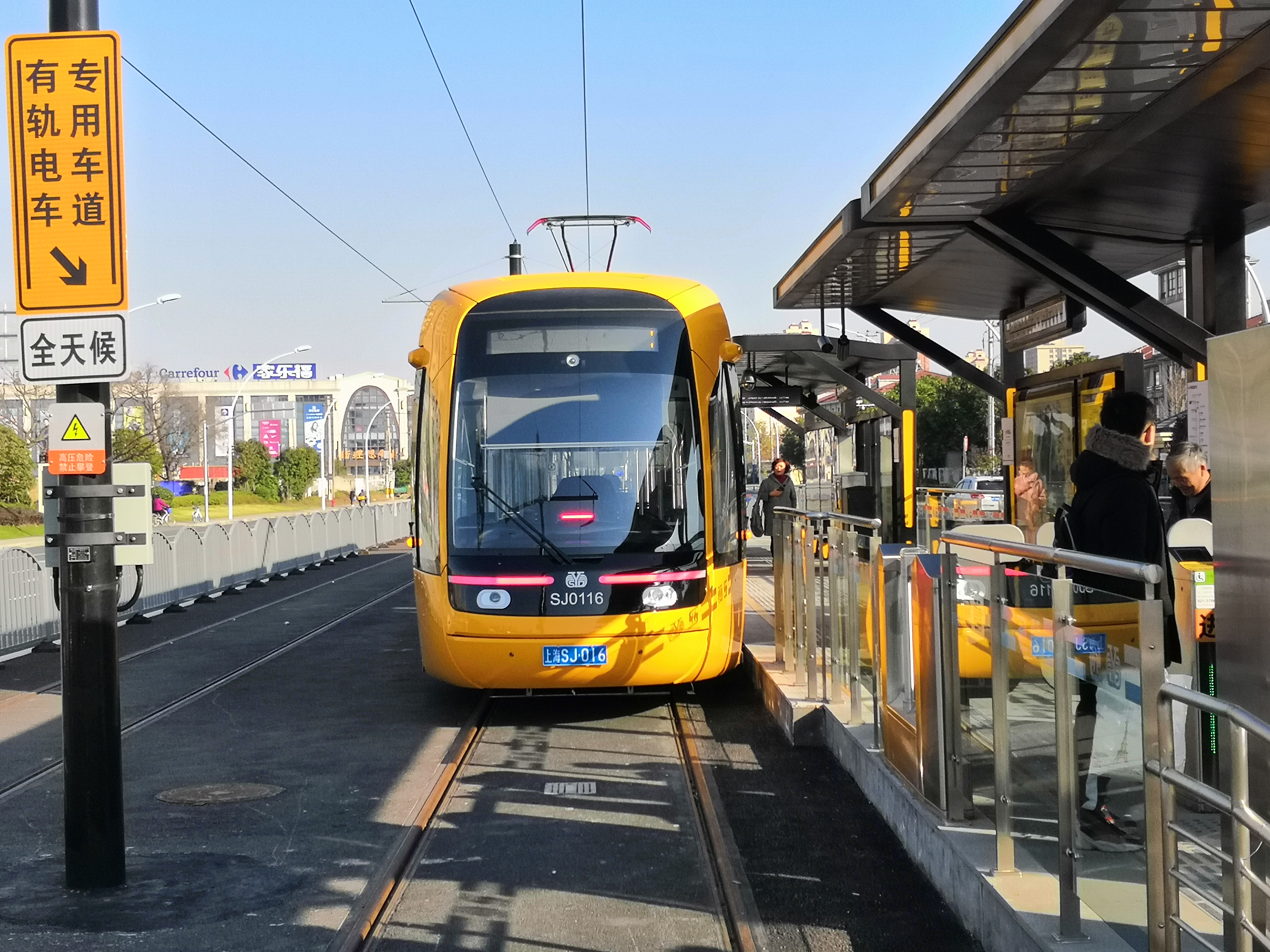 一列电车停靠在仓华路站内